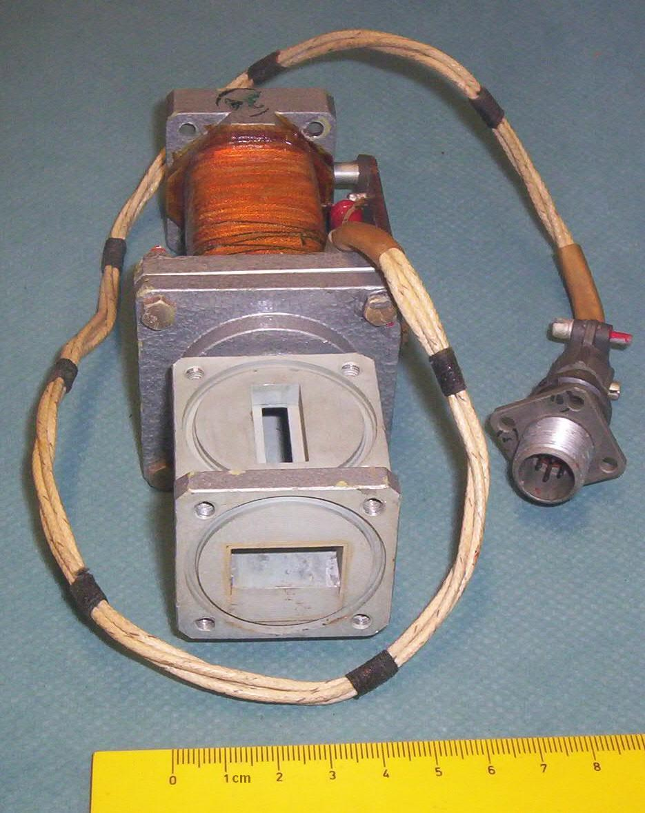 Faraday-Rotator als Hohlleiter-Bauteil für Mikrowellen, ca. 9&Gnbsp;Hz. Der Ferritstab befindet sich im Hohlleiter im Bereich der Spule hinten.